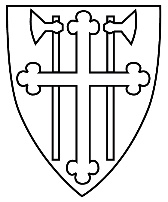 Olavsmerket (her svart i kvitt) er våpenet til Den norske kyrkja. Frå forskrifta (etter [ 2. Generelle bestemmelser om bruk Som hovedregel kan våpenet bare brukes av Den norske kirkes offisielle organer under utøvelse av kirkelig tjeneste, og til dekorasjon.- - Vi går ut i frå at biletet av våpenet kan brukast for å illustrere artiklar som gjeld Den norskje kyrkja. Sjå commons, som brukar lisensen